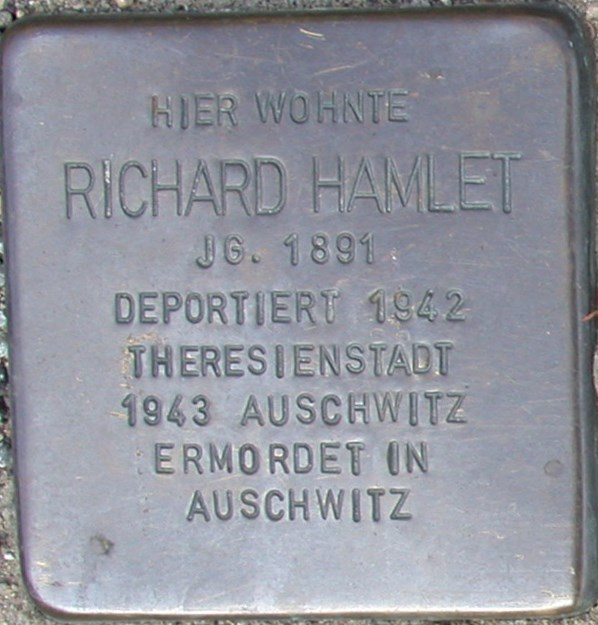 Deutschland - Nordrhein-Westfalen - Kreis Lippe - Bad Salzuflen: Stolperstein zur Erinnerung an Richard Hamlet